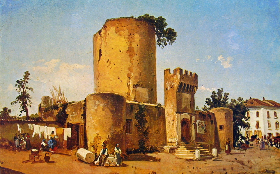 Veduta di Nola, cm. 25 x 39, Museo di San Martino, Napoli.